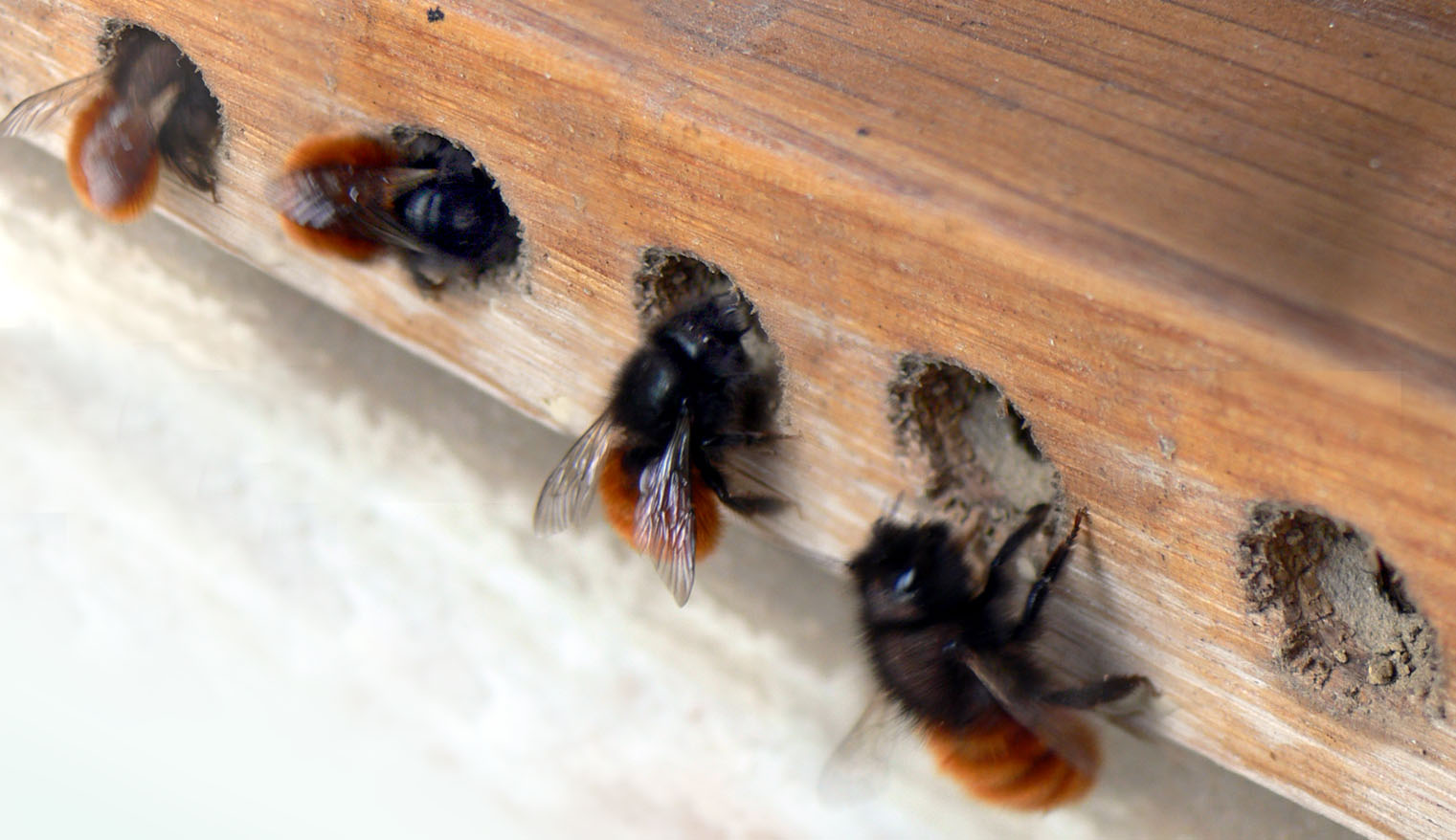 première apparition (plus précoce qu'en 2008) d'osmies (Osmia cornuta) actives, à Lambersart près de Lille. Montage présentant plusieurs attitudes de l'osmie. Les petites particules sous le trou sont des restes des parois construites l'an dernier. On observe de petites bagarres entre deux osmies cherchant à occuper le même trou (bruyant vrombissement de celle qui est déjà dans le trou, qui persiste quelques secondes après que l'autre abeille a quitté le trou). Ces trous étaient occupés l'année précédente.